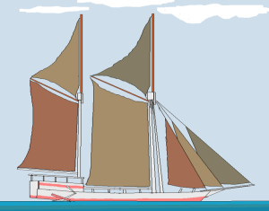 Zeichnung einer Pinisi nach einem Foto aus Hollander/Mertes, Solange sie noch segeln, Hamburg 1983.